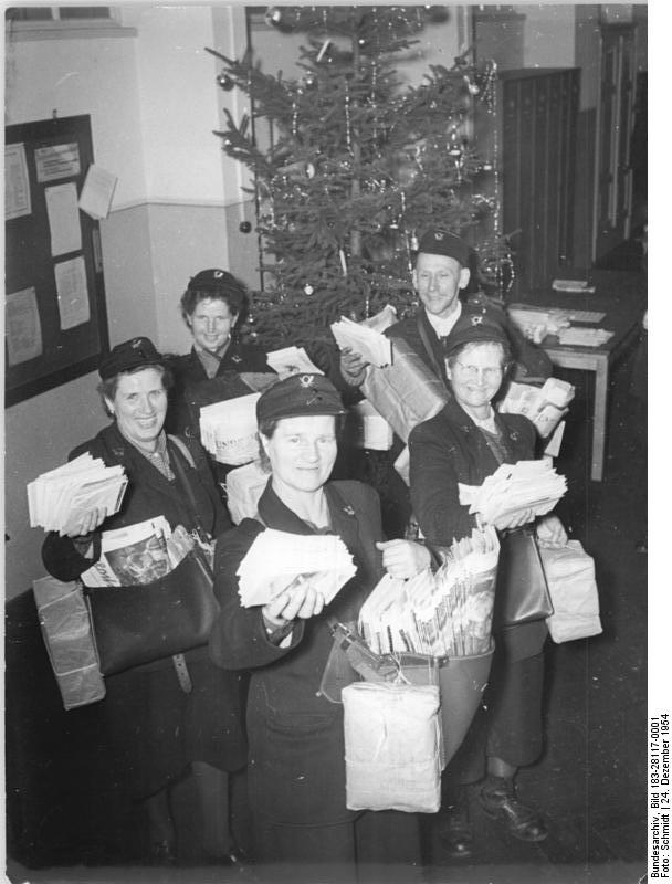 Zentralbild Schmidt 2Mot. 24.12.1954 -2694-Hauptpostamt Gotha, Republiksieger im Massenwettbewerb des III.Quartals 1954 im Massenwettbewerb der Hauptpostämter der DDR wurde zum zweiten Mal in diesem Jahr das Hauptpostamt Gotha Siegerbetrieb und von der Regierung mit der Wanderfahne des Ministerrates, verbunden mit einer Prämie von DM 8.000.- ausgezeichnet. Die vorbildlichen Erfolge sind das Ergebnis des kameradschaftlichen Erfahrungsaustausches der Kollegen untereinander vor allem bei der Zeitungs- und Postzustellung, sowie im Schalterdienst.UBz: Die Brigade "Theo Neubauer" (v.l.n.r.) Toni Mahle, Hilda Ellenberger, Toni Mahle, Agnes Walders und Anton Schwitzer, die als beste Brigade der Briefzusteller von der Regierung als Brigade der besten Qualität" ausgezeichnet wurde. " Wenn auch die Vorweihnachtstage viel Arbeit für die Briefzusteller mit sich brachte, so macht es sauber umsomehr Freude, wenn amn DDR-Sieger im Massenwettbewerb wurde, " sagten die Kolleginnen. Dass den Kollegen ihre Arbeit Freude macht, sieht man an ihren lachenden Gesichtern.